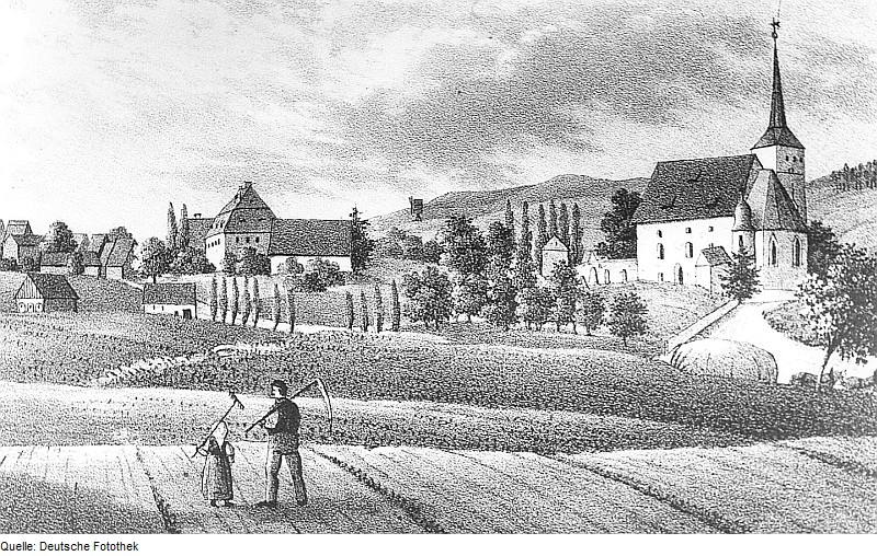 Original image description from the Deutsche Fotothek Neusalza-Spremberg. Ortsansicht mit Bockmühle